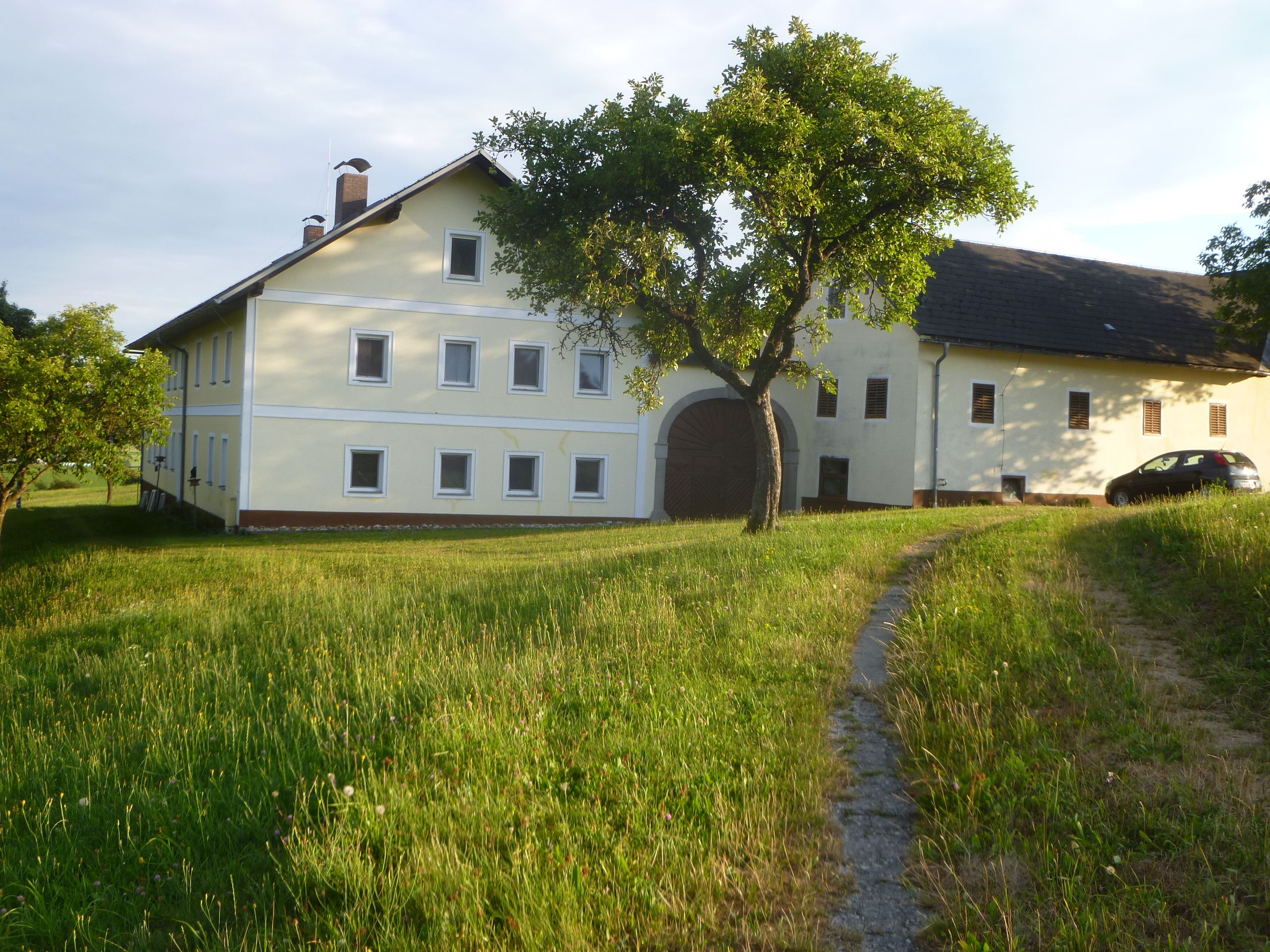 Genghof